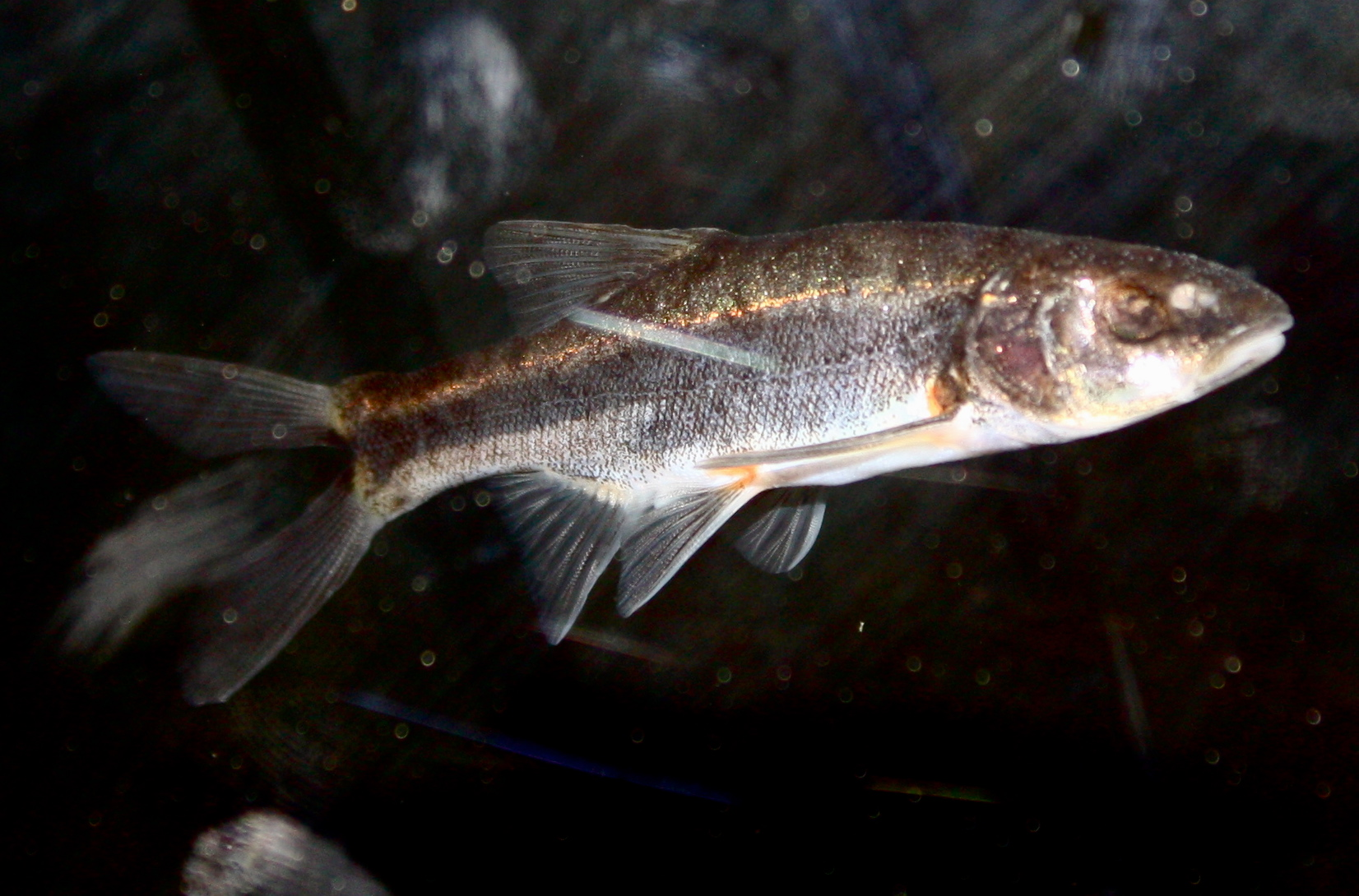 Little Colorado River spinedace